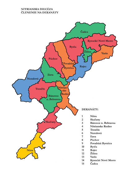 Bistum Neutra vor 2008